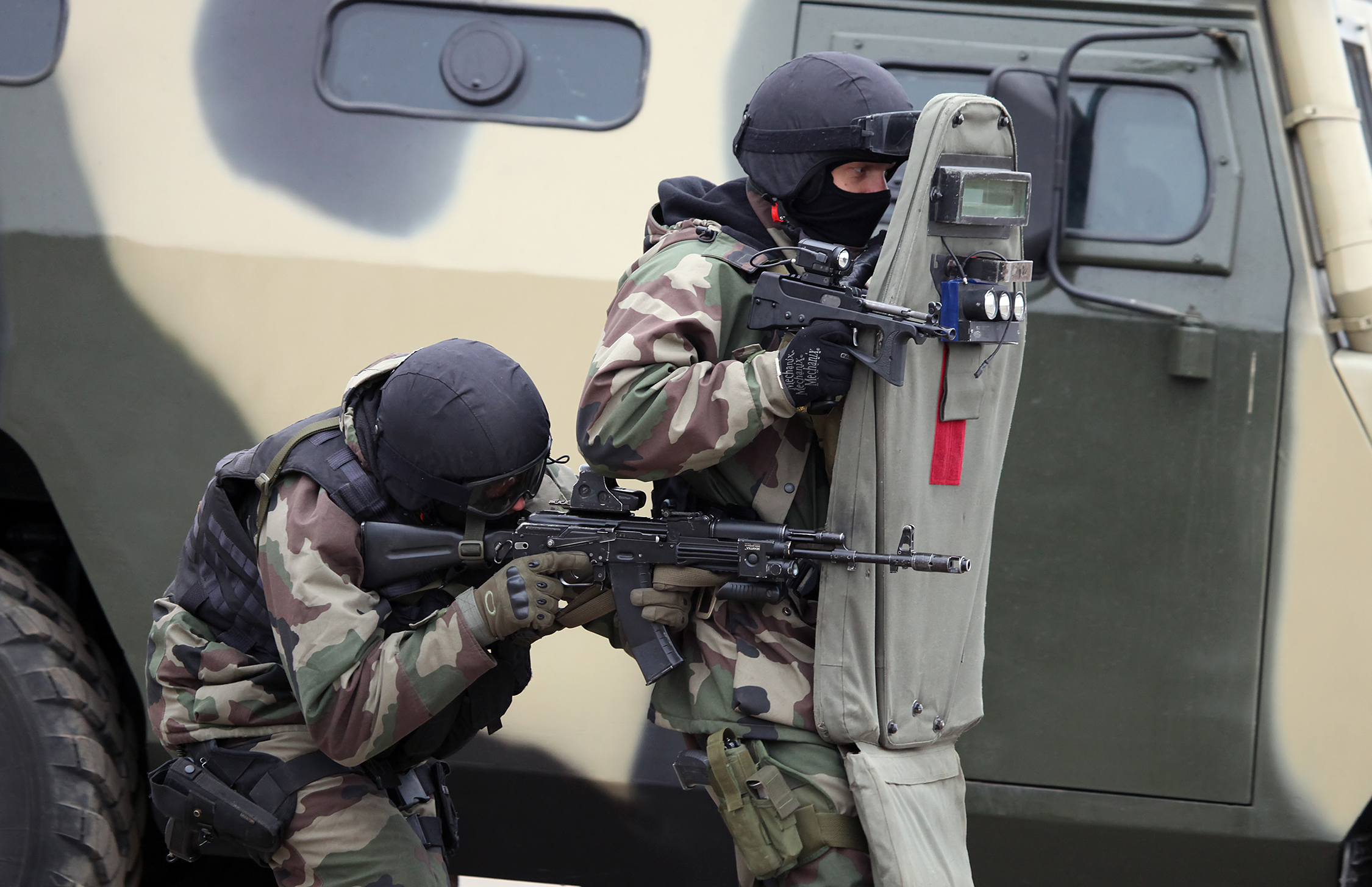 Роспуск